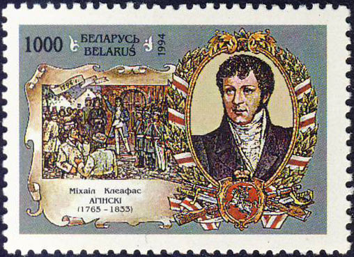 Беларуская (тарашкевіца): Міхал Клеафас Агінскі. Белпошта